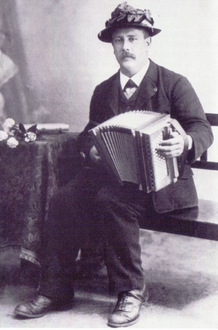 nach dem Wettspiel 1924 in Luzern mot Kopfkranz.